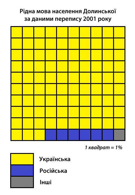 Інфографіка розподілу населення міста Долинська за рідною мовою згідно з даними перепису 2001 року. Джерело: Розподіл населення Кіровоградської області за рідною мовою (у % до загальної чисельності населення) за переписом 2001 року